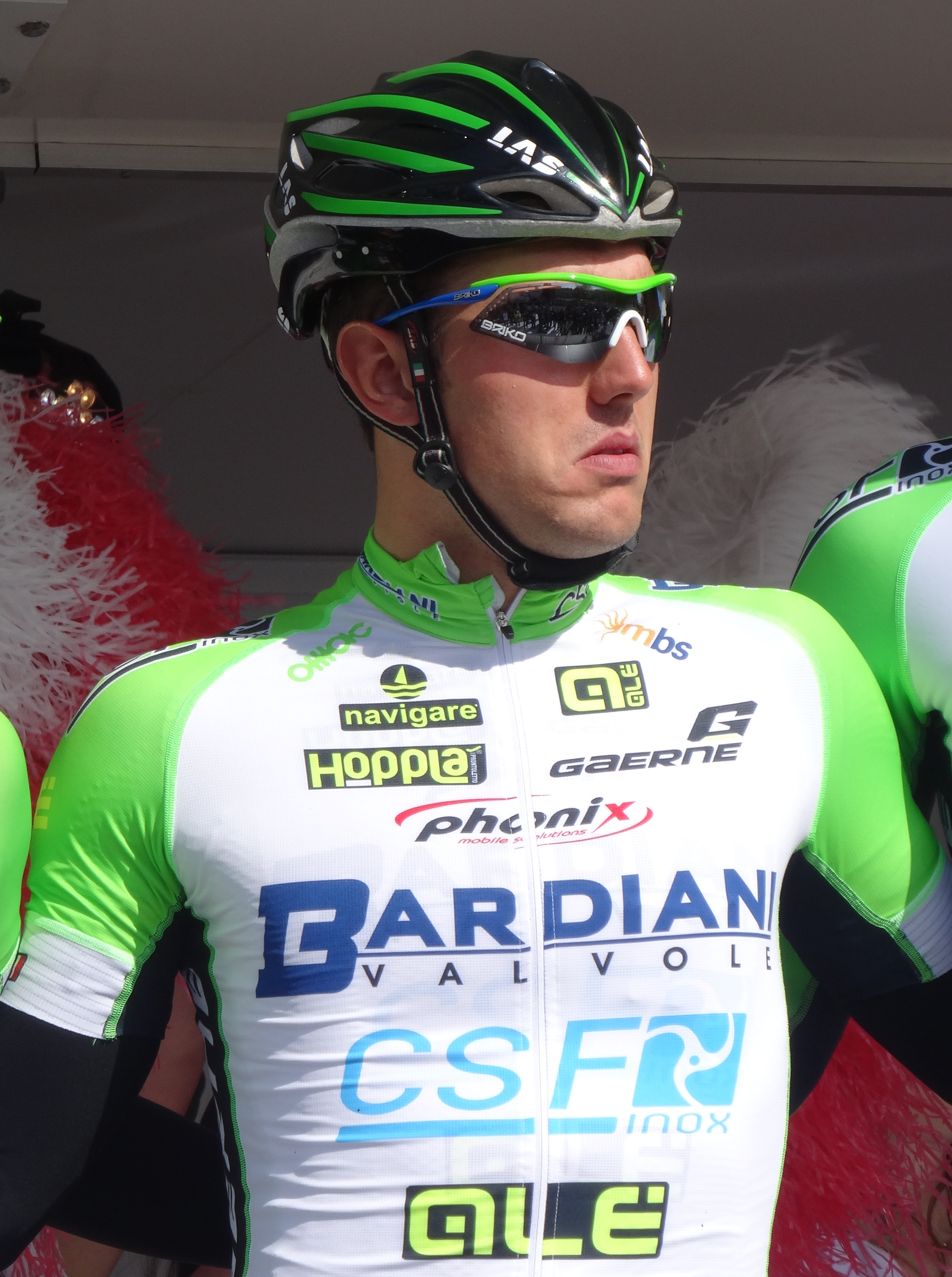 Reportage réalisé le jeudi 17 avril à l'occasion du départ et de l'arrivée du Grand Prix de Denain 2014 à Denain, Nord, Nord-Pas-de-Calais, France.